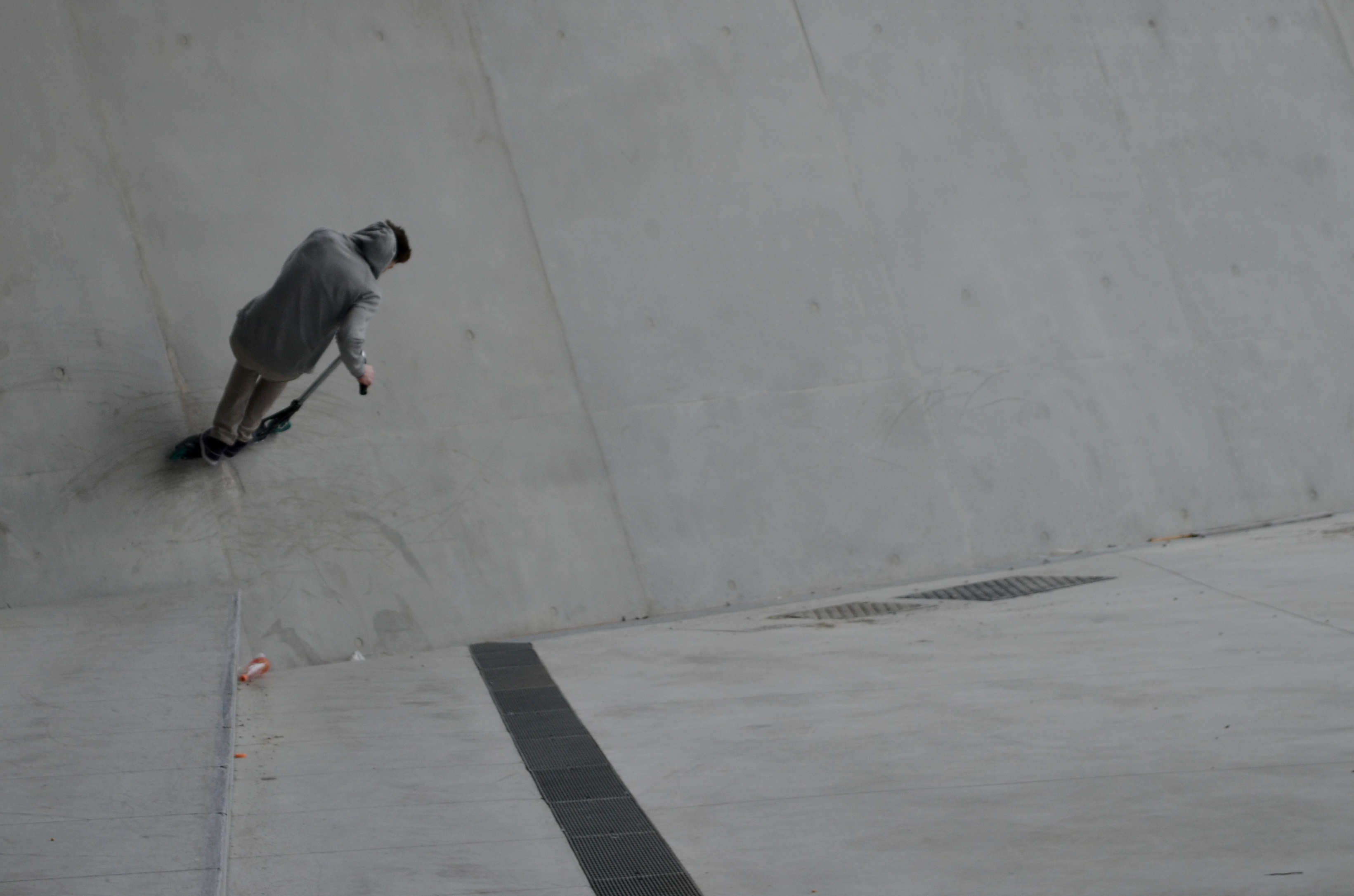 Trottinette Freestyle au musée des confluences en avril 2015.